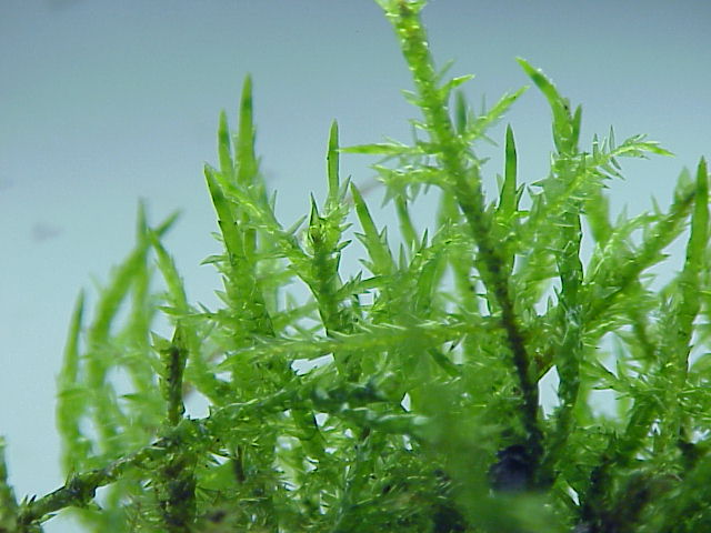 Species: Calliergonella cuspidata Family: ' Image No. 1